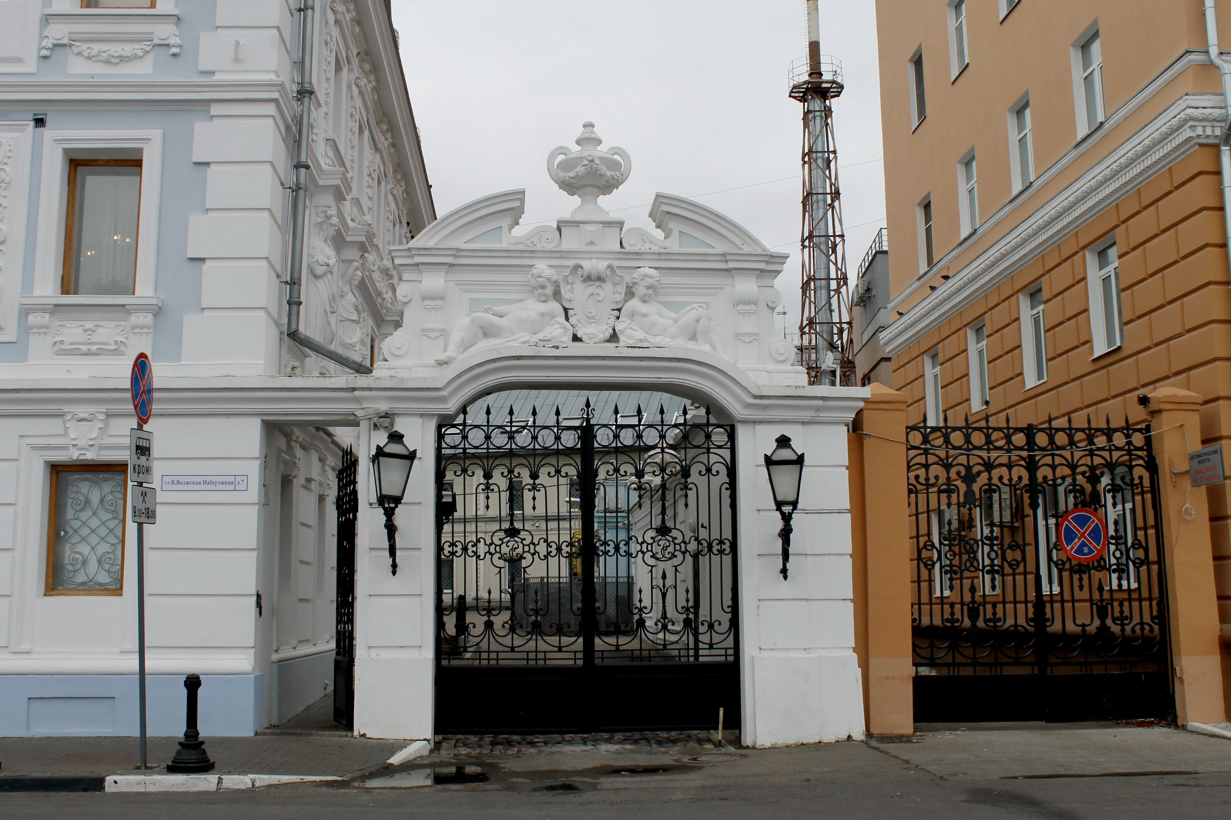 Особняк С. М.Рукавишникова: набережная Верхневолжская, 7, Нижний Новгород, Нижегородская область